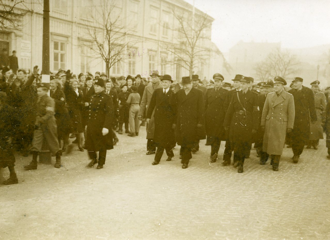 RA/RAFA-3309/U 38B/10/38-10-45 img155 Nasjonal Samling, forkortet NS, var et norsk politisk parti som ble grunnlagt av Vidkun Quisling i 1933 og ble oppløst ved frigjøringa i 1945. Ideologisk fulgte partiet den tyske nasjonalsosialismen tett, og NS ble støtteorganisasjon for den tyske okkupasjonsmakta i Norge under andre verdenskrig.